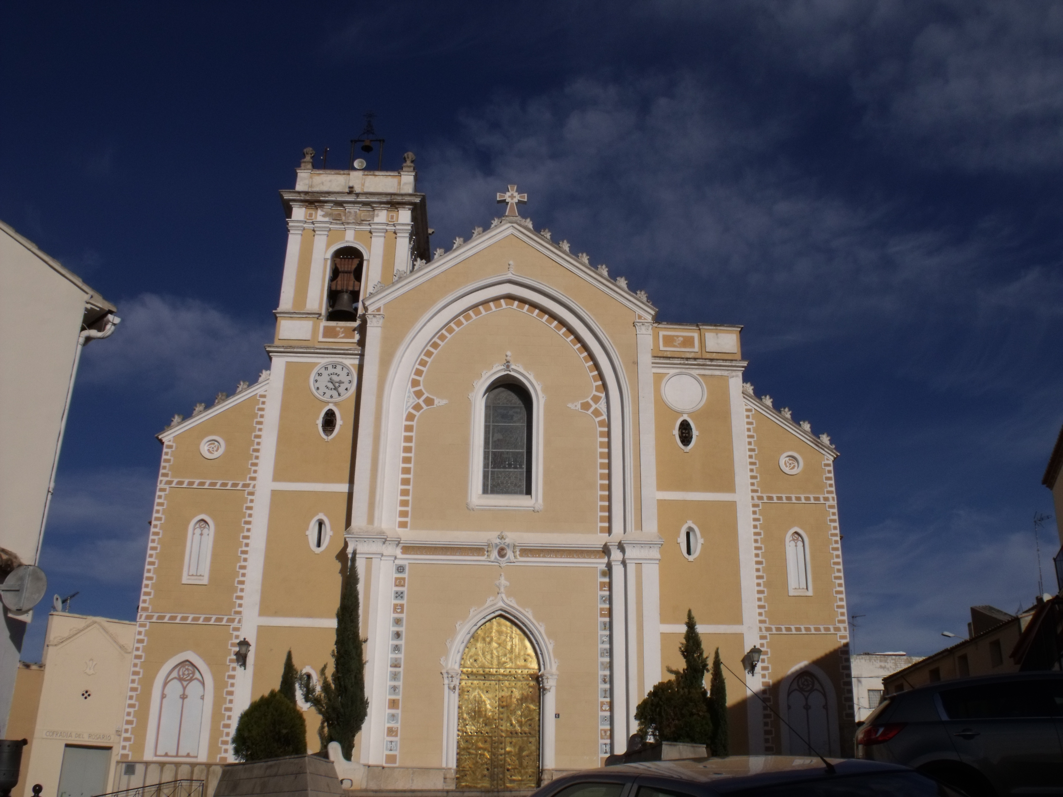 Villamarchante: iglesia.